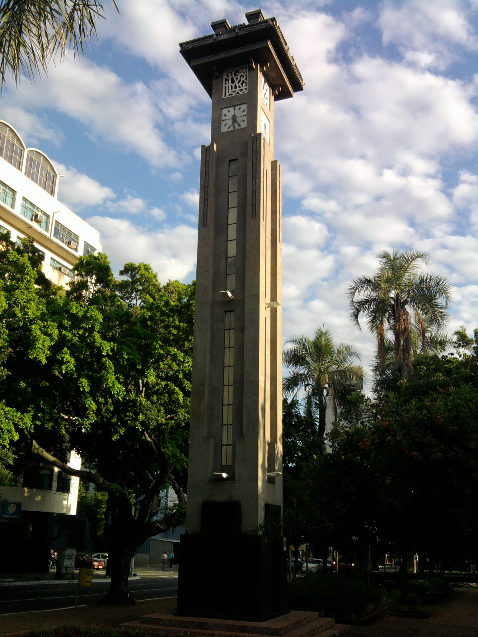 Relógio - Avenida Goiás - Goiânia - Goiás - Brasil